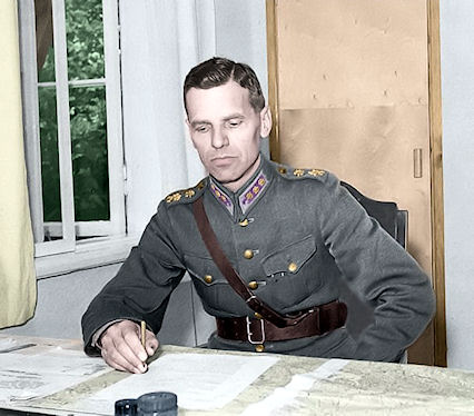 Jatkosodan IV Armeijakunan esikuntapäällikkö Valo Nihtilä.